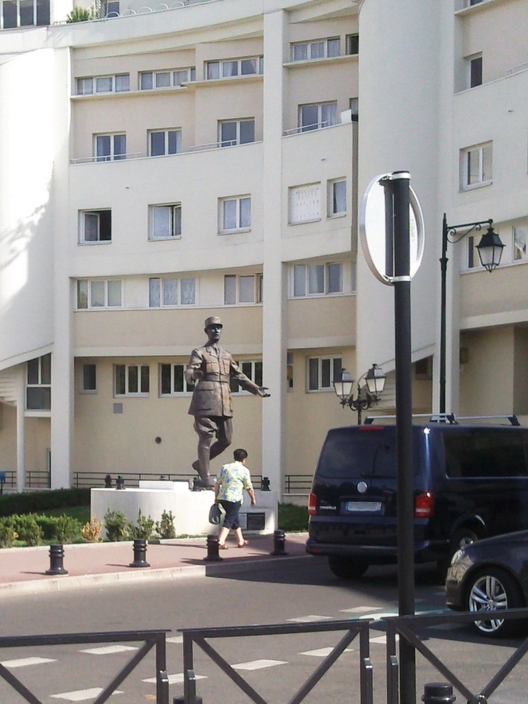 Statue du Général Charles de Gaulle à Drancy